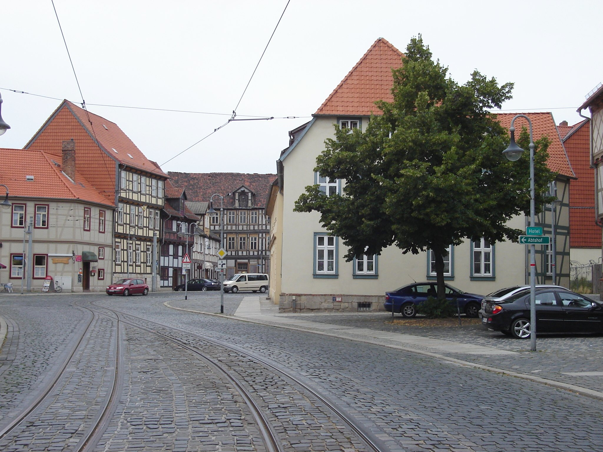 Halberstadt, Straße Voigtei